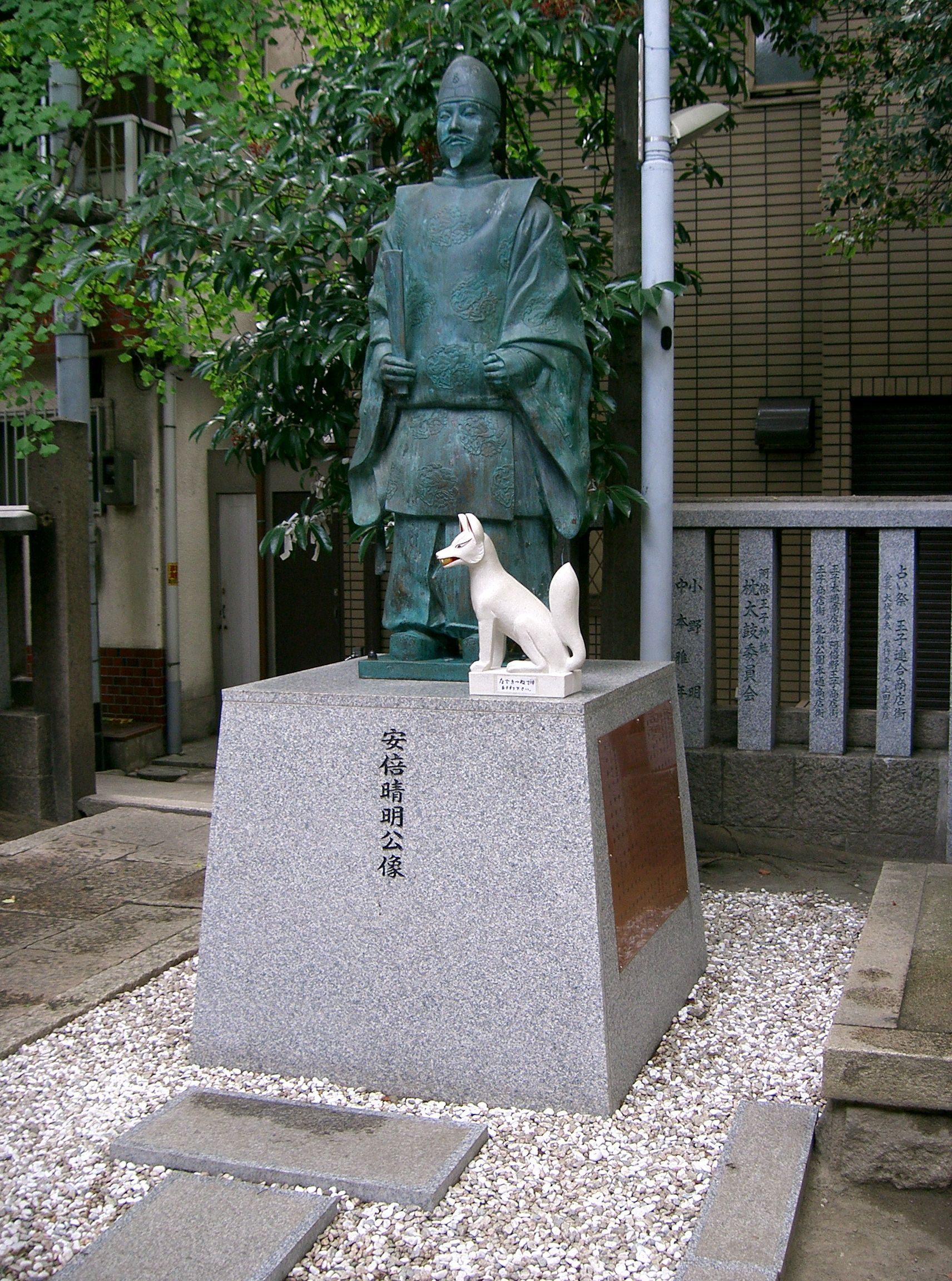 安倍晴明神社の安倍晴明像